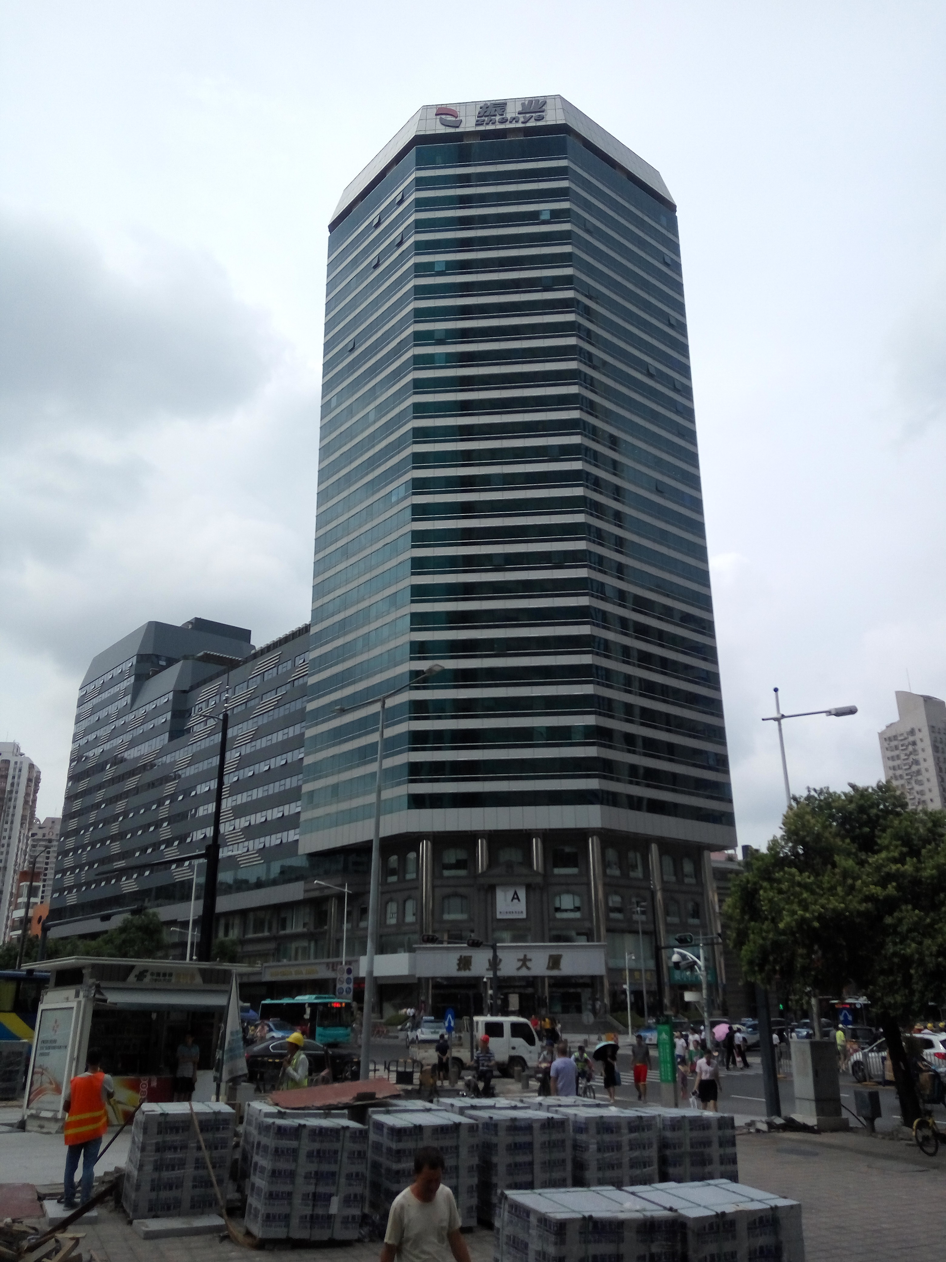 振业大厦（深圳振业集团总部）